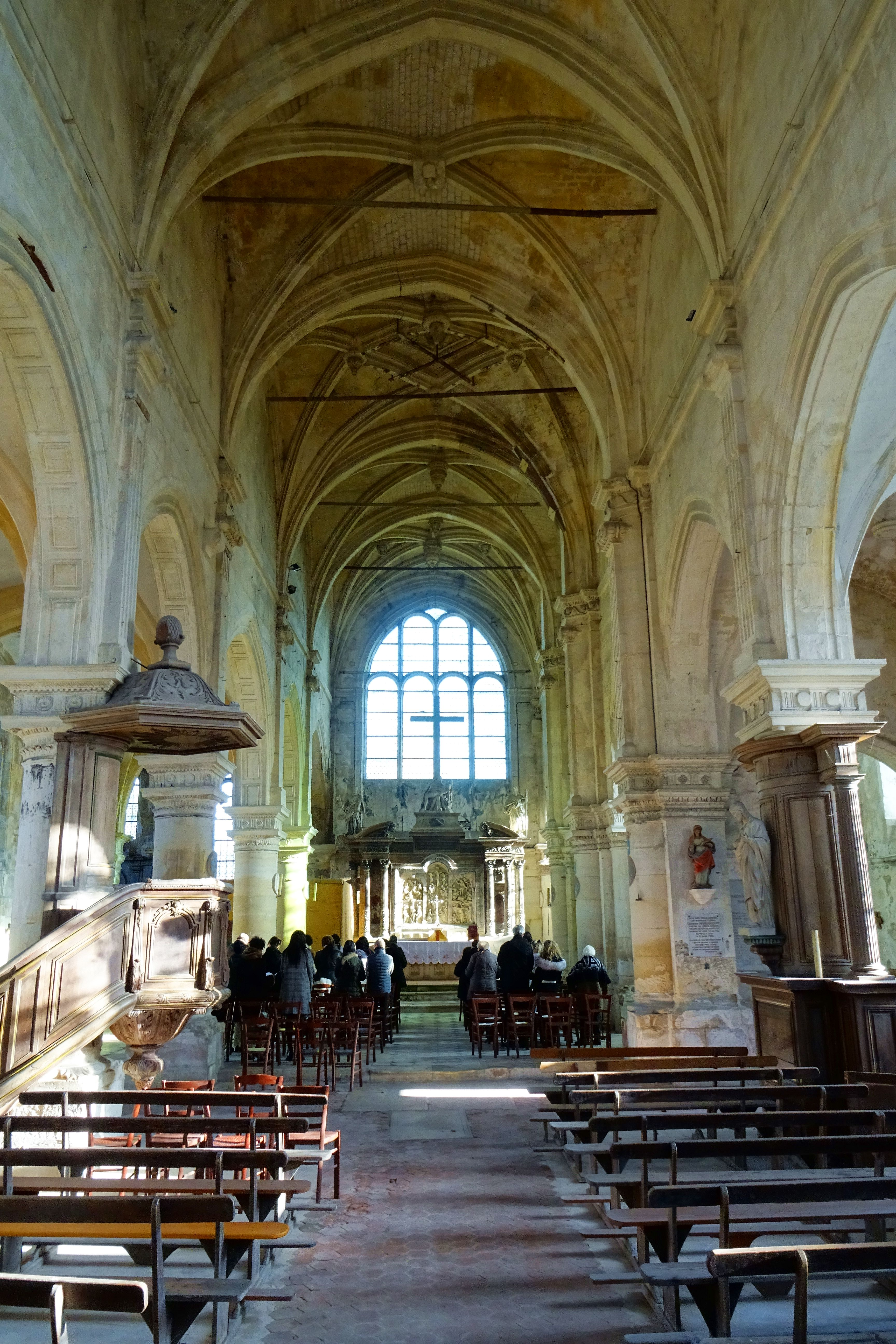 Intérieur de l'église - voir le titre du fichier.